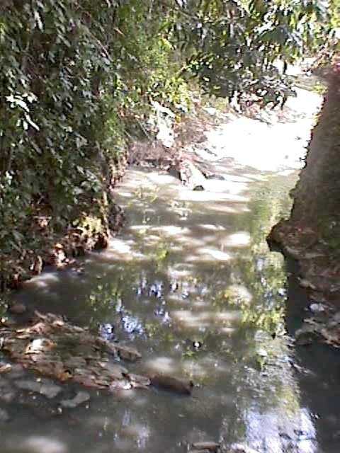 Quebrada La Boyera a nivel del Famatodo la Boyera